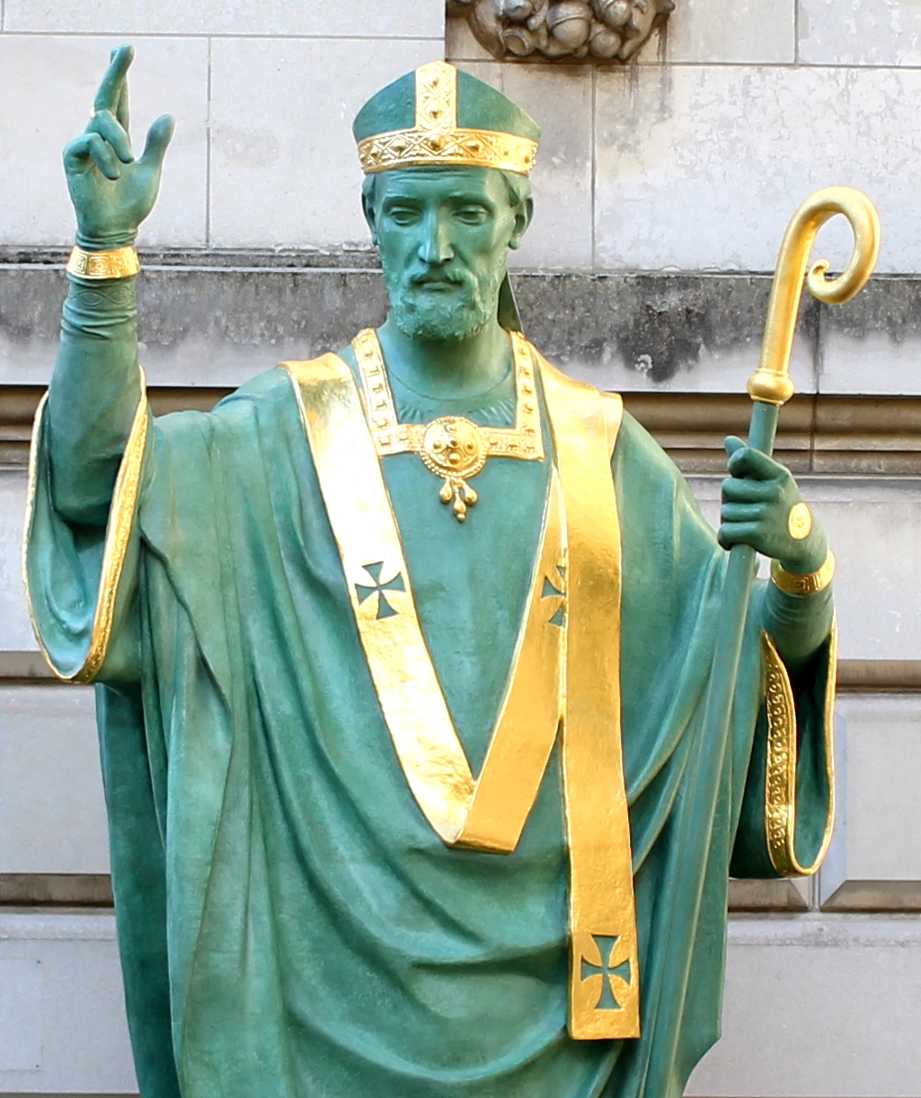 La statue de Saint-Martin, habituellement en haut de la basilique Saint Martin (Tours, France), exposée au public après restauration.